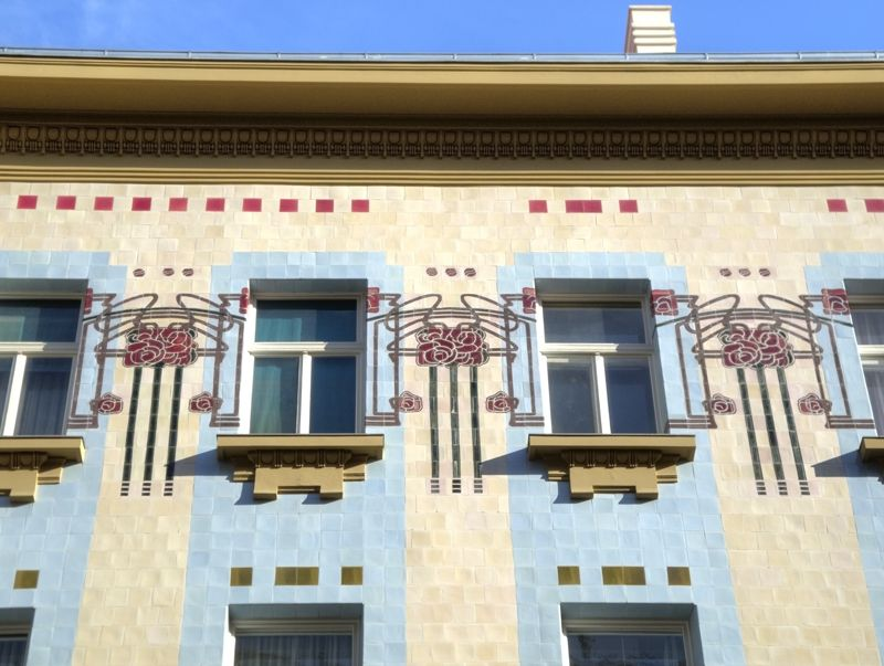 Zagreb